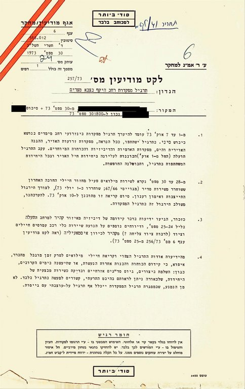 לקט מודיעין על התרגיל המצרי - תחריר 41